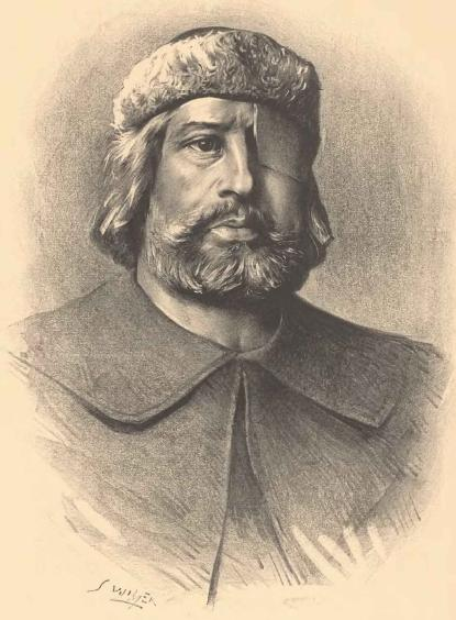 Portréty českých osobností od Jana Vilímka